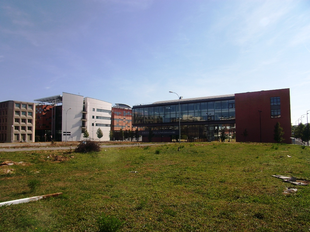 Bâtiment des sciences et bibliothèque de l'Université d'Évry-Val-d'Essonne